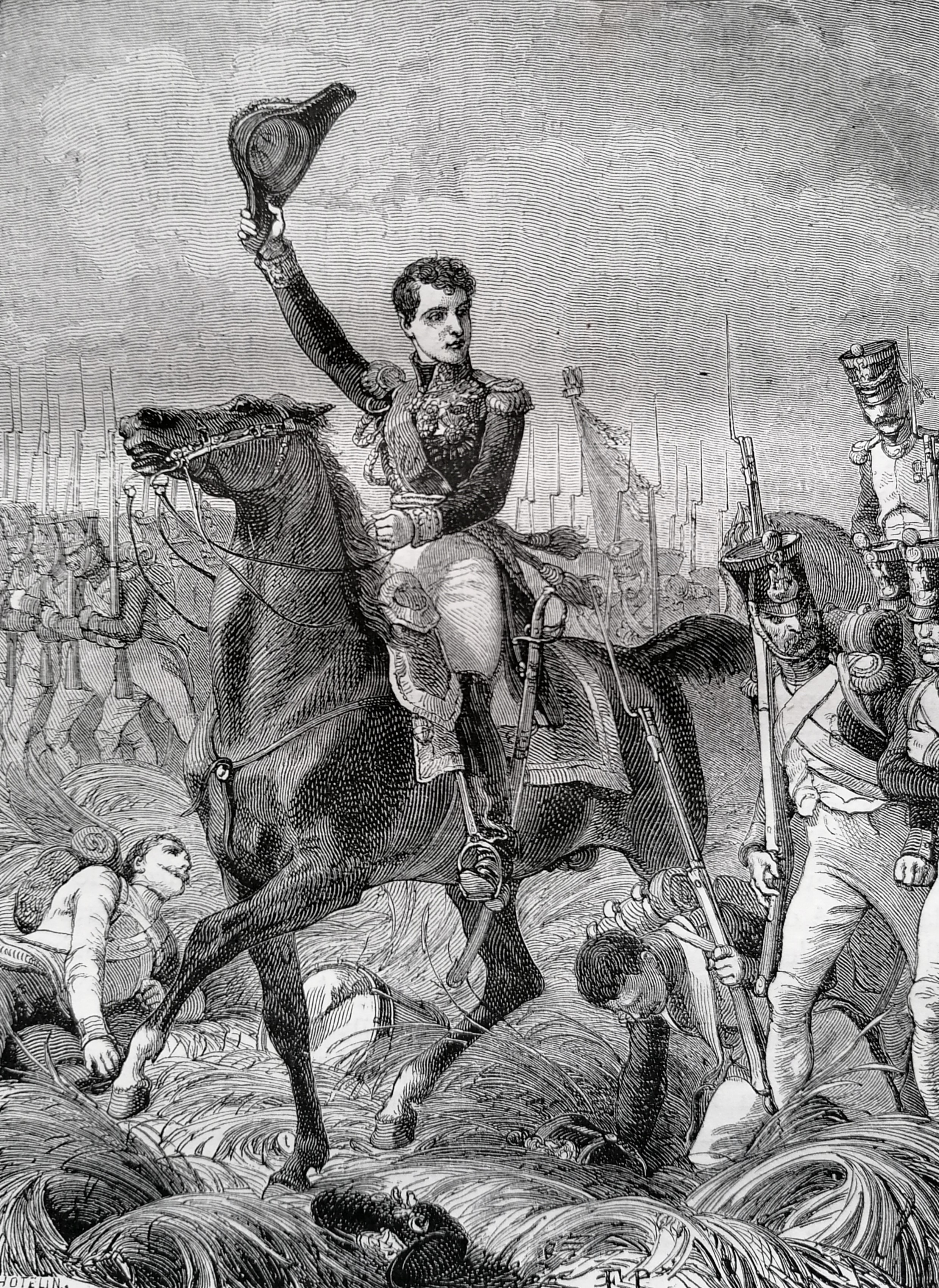 Le général Gudin en campagne. Commandant la 3e division du corps de Davout, il s'illustre à Auerstaedt, Eylau, Eckmühl et Wagram. Il meurt des suites des blessures reçues à la bataille de Valoutina Gora pendant la campagne de Russie, en 1812.